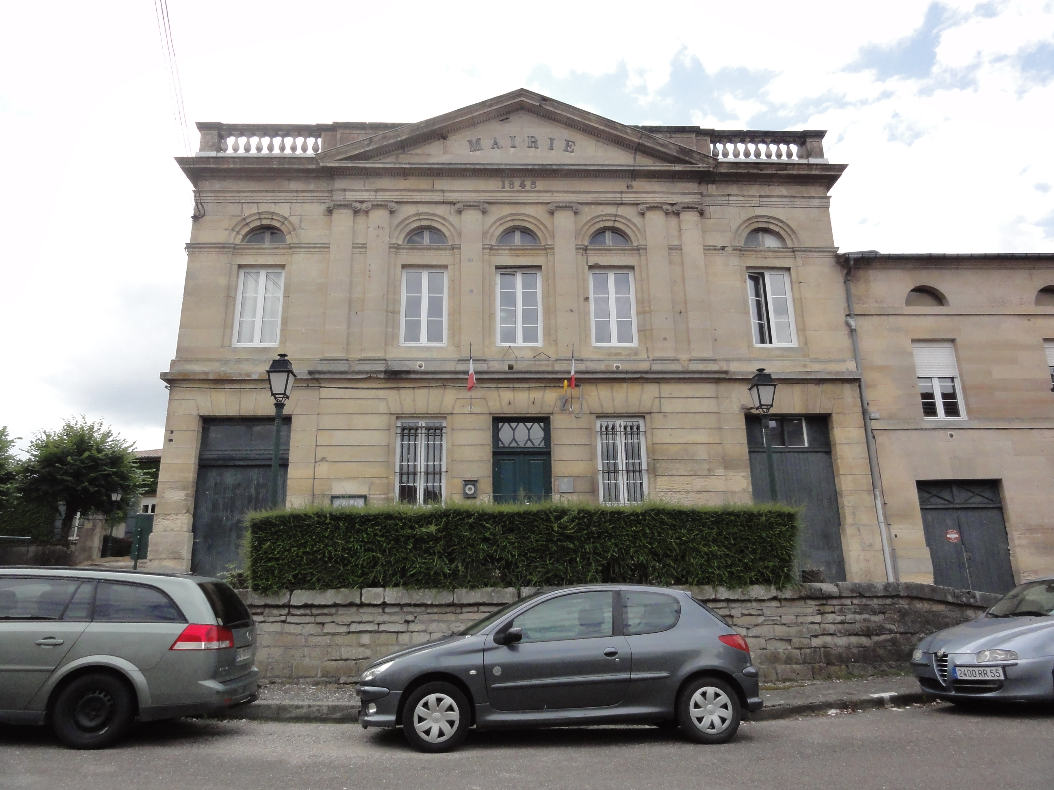 Saudrupt (Meuse) mairie